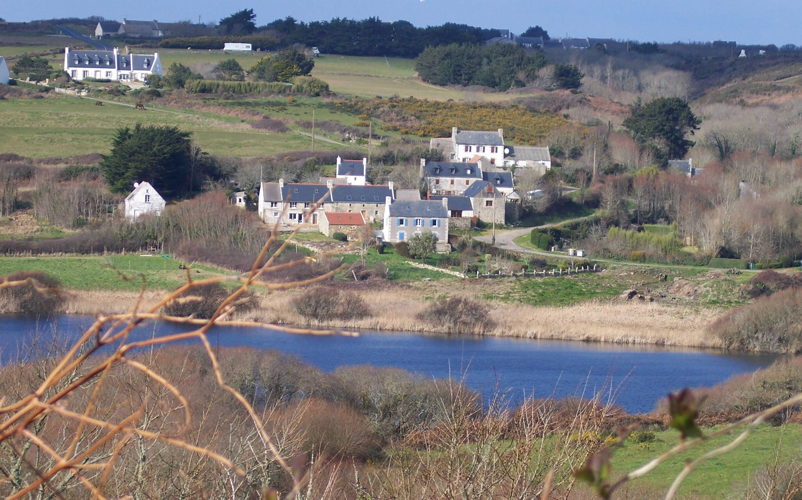 la campagne de Cléden-Cap-Sizun - Étang de Laoual, près de la baie des Trépassés